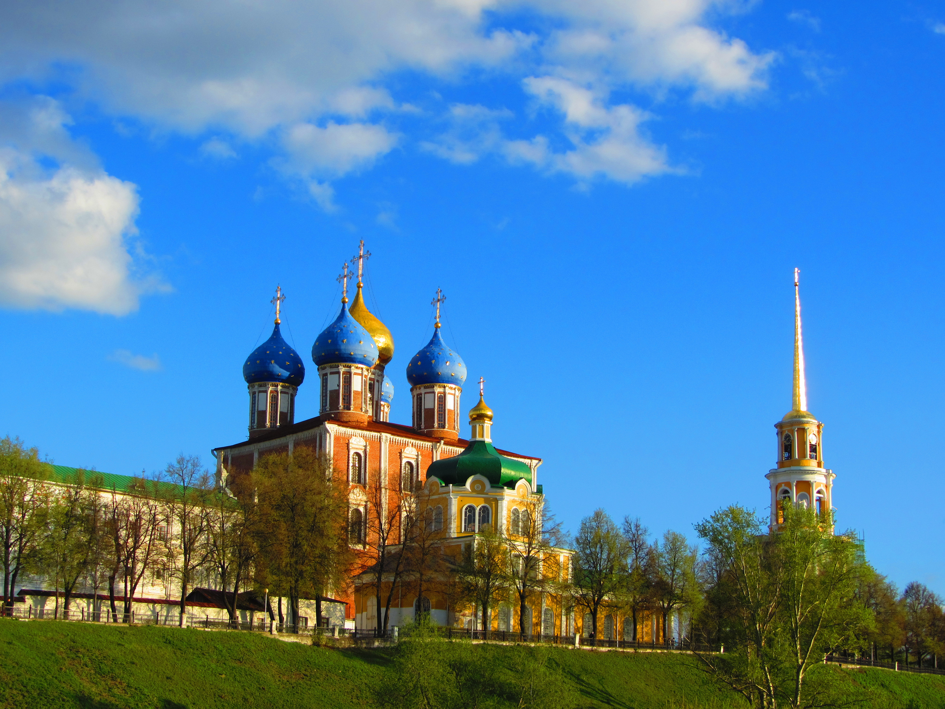 Рязань